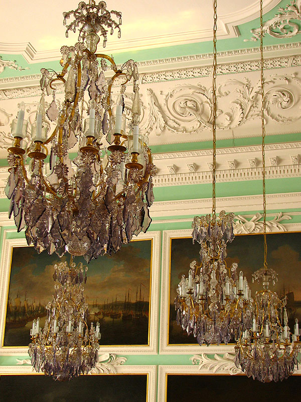 Тронный зал